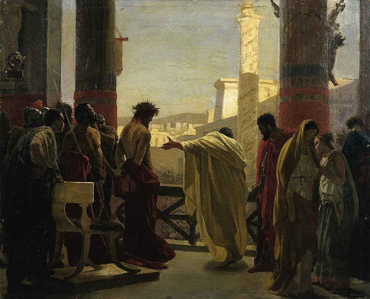 Draft